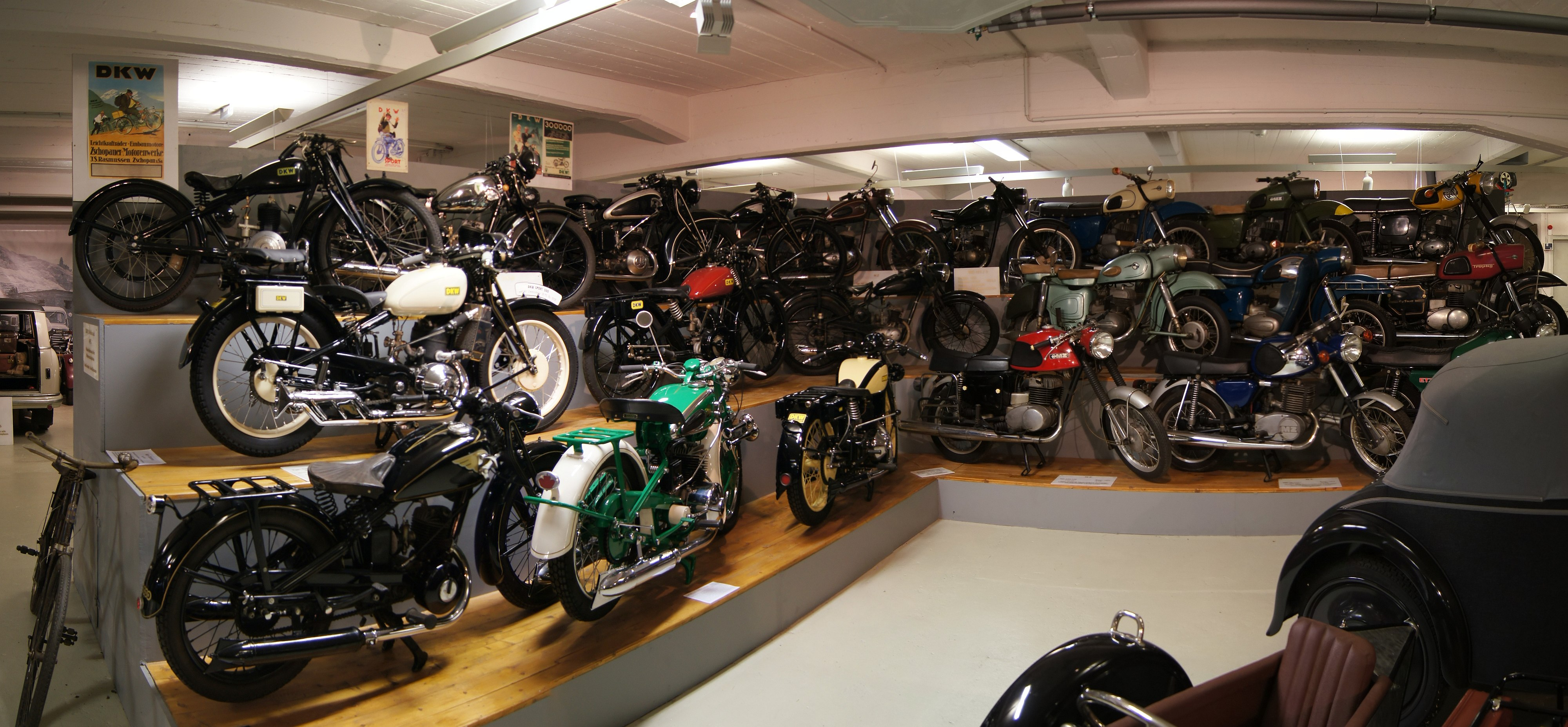 Diverse Motorräder von DKW und MZ